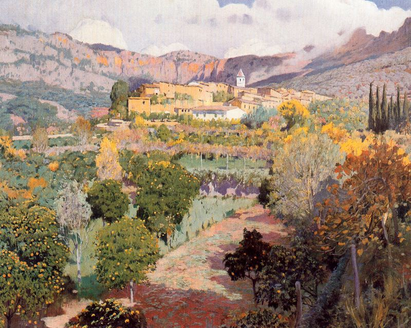 The orange tree valley, Biniaraix (Majorca).label QS:Les,"El valle de los naranjos, Biniaraix (Mallorca)." label QS:Len,"The orange tree valley, Biniaraix (Majorca)."